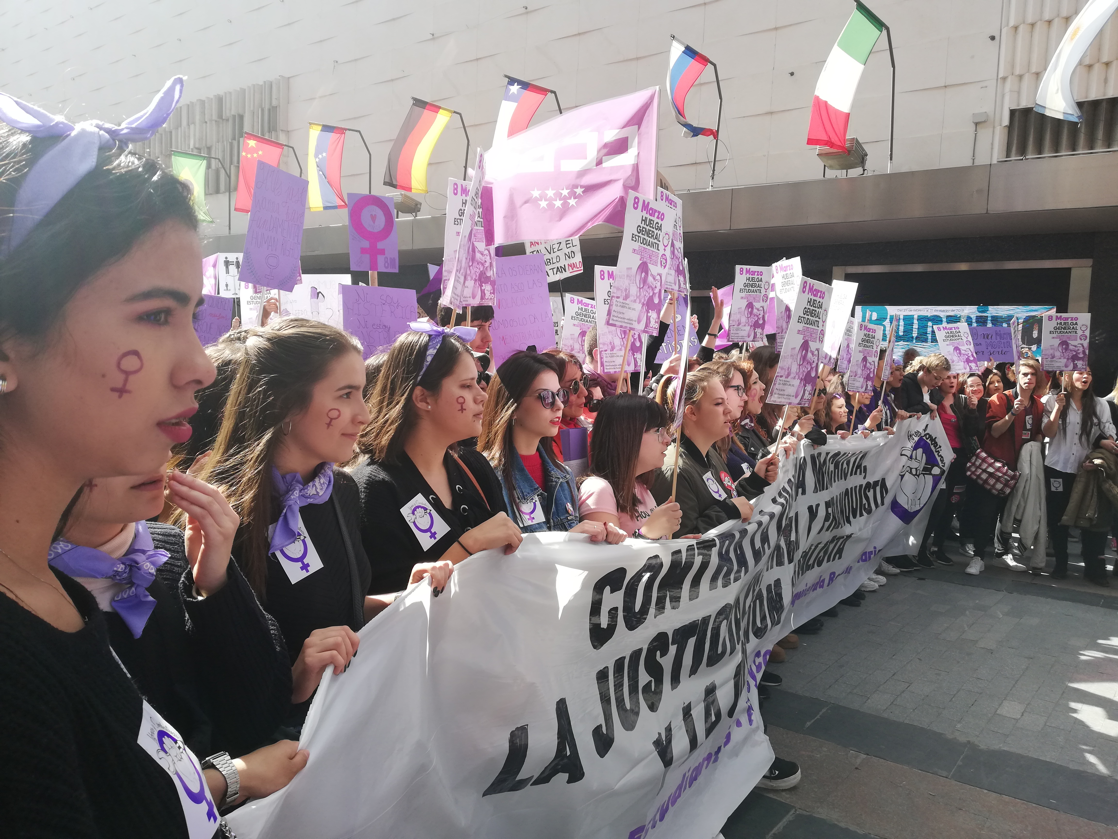 Concentración del Sindicato de Estudiantes en calle Preciados con motivo de la Huelga Feminista 8M de 2019